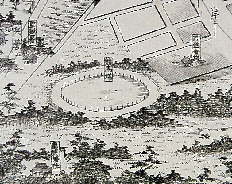 1891年(明治24年) 旧函館競馬場